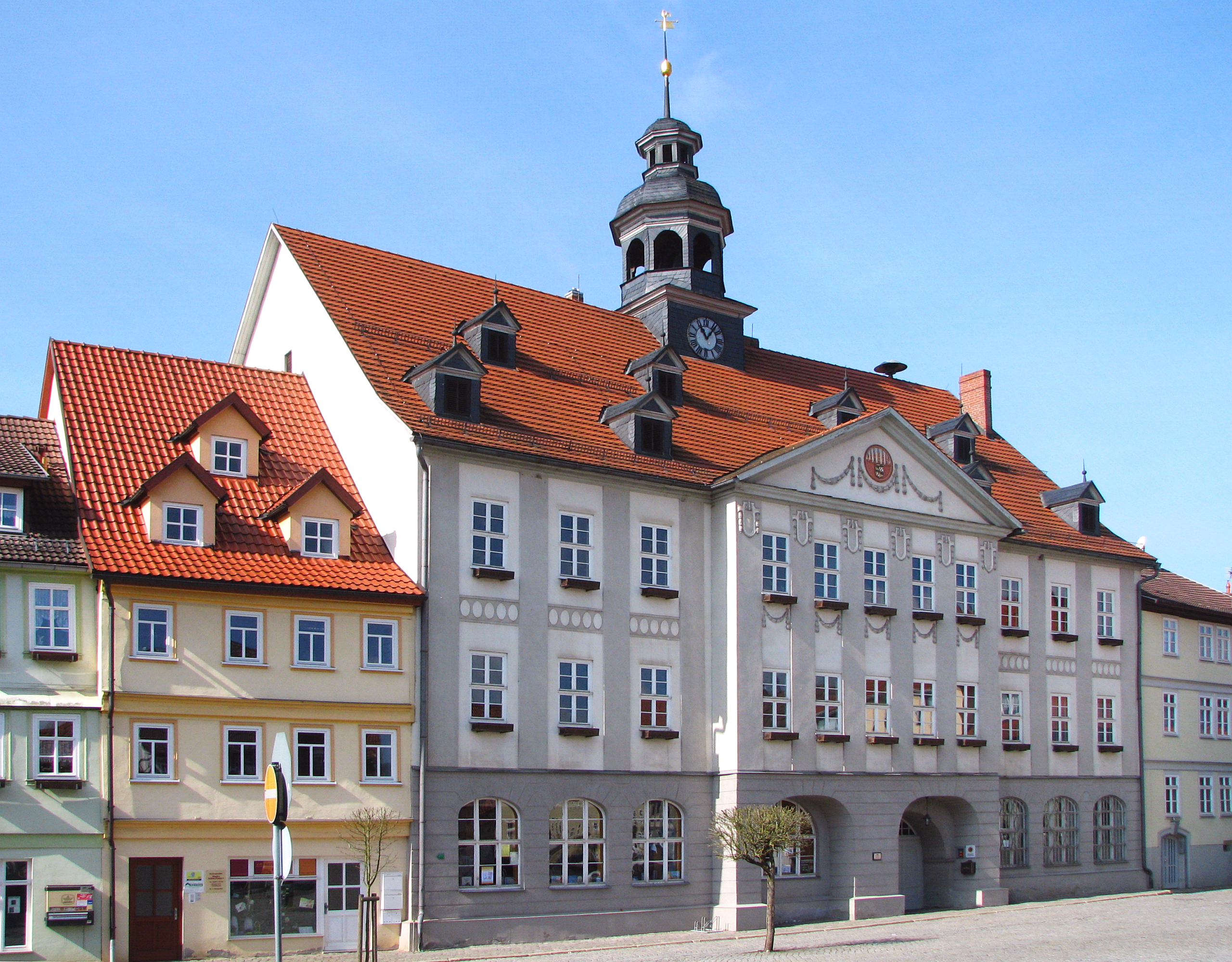 Themar in Thüringen: Rathaus am Marktplatz. Das Bauwerk wurde errichtet von 1706-1711. Foto Wolfgang Pehlemann IMG_2720